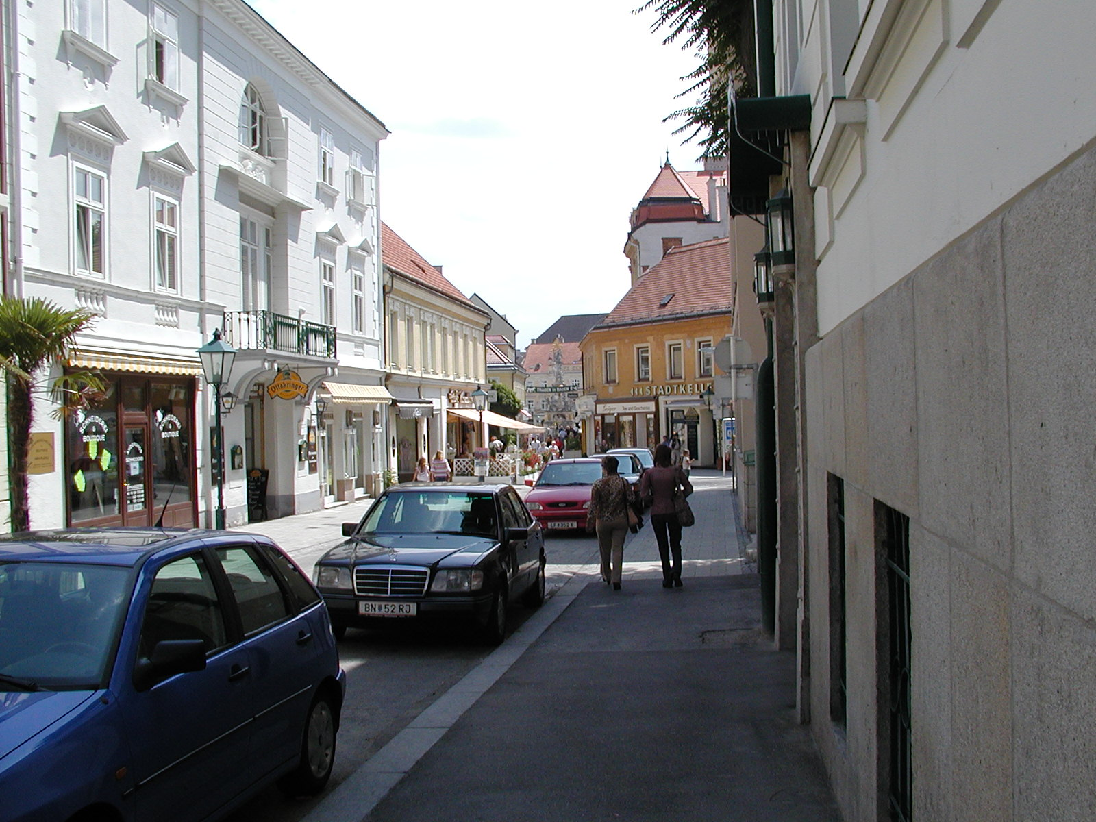 Baden, Blick von der Theresiengasse Richtung Hauptplatz, 2003-07-06